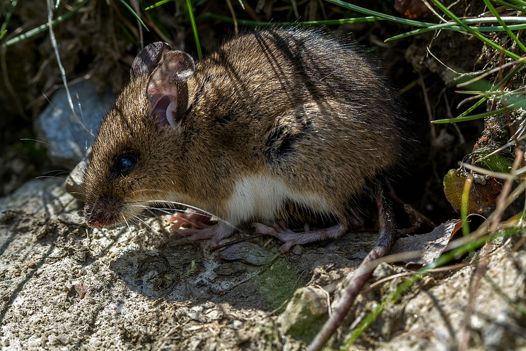 Waldmaus im Steingarten, unterirdisch lebend (Sachsen, 400 m ü. M.)